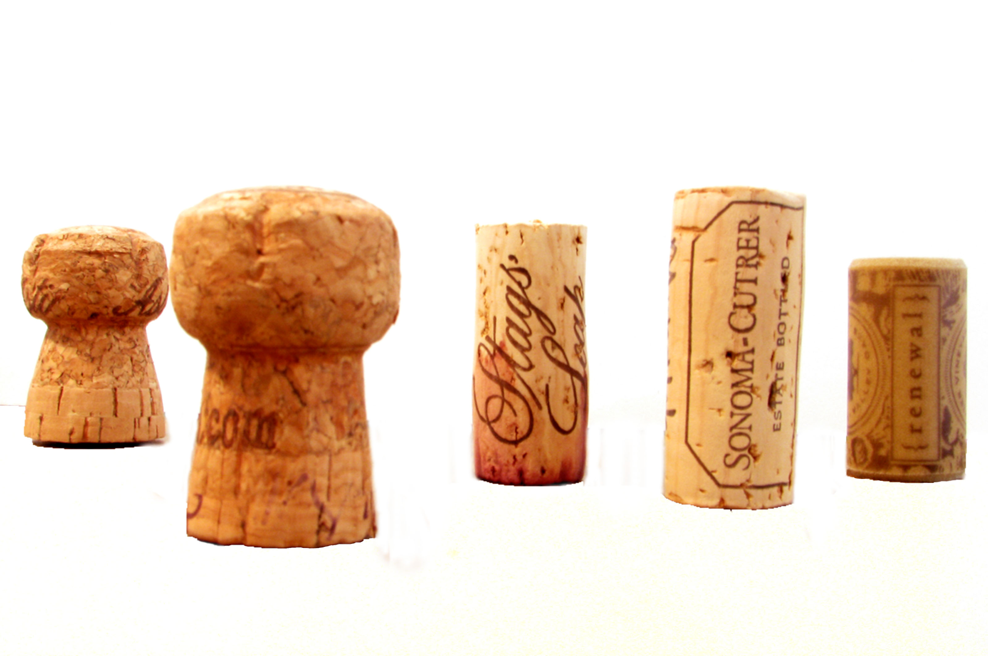 Assortiment de bouchons de bouteilles à vin